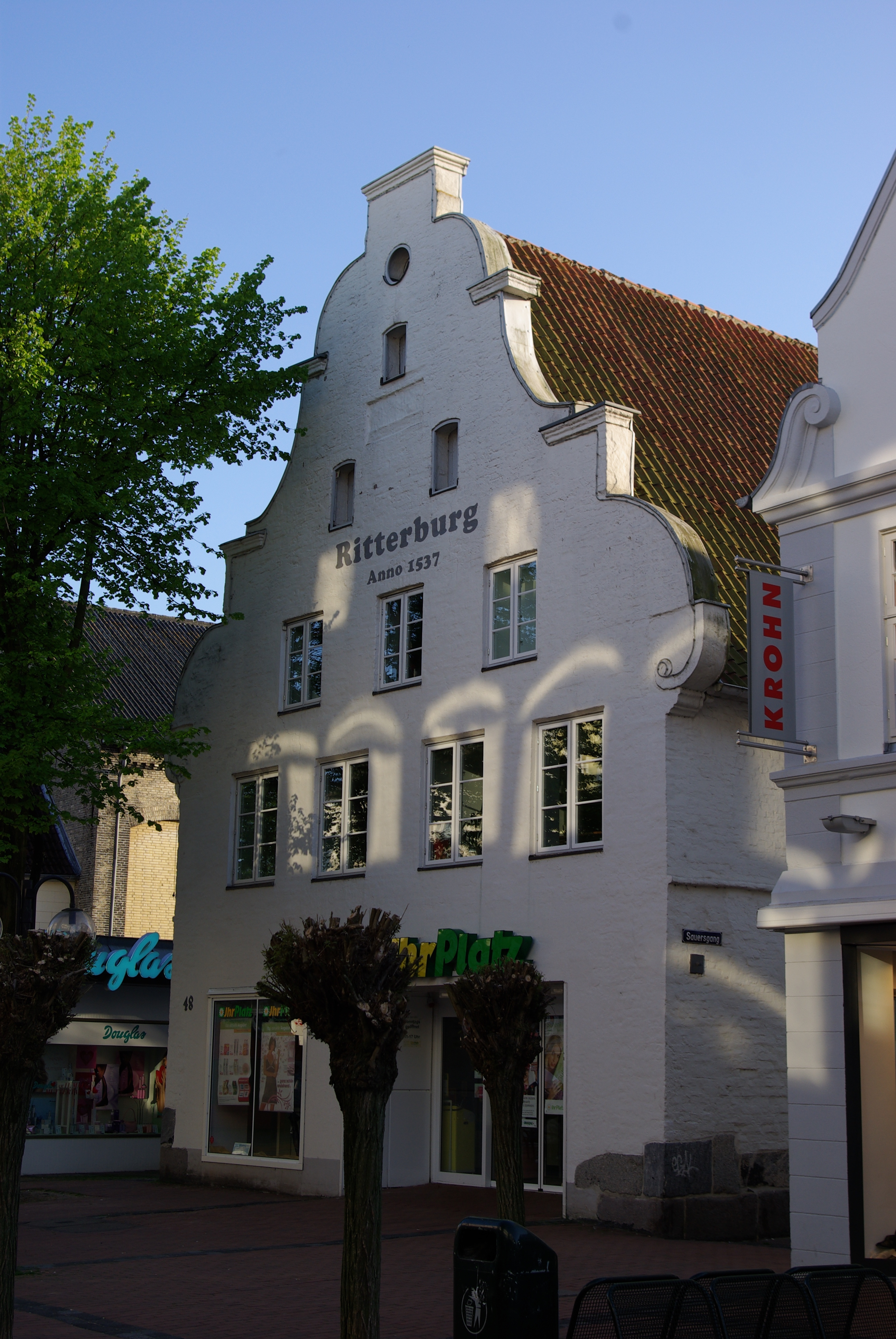 Eckernförde in Schleswig-Holstein. Das Haus stammt aus dem Jahre 1537 und steht unter Denkmalschutz.